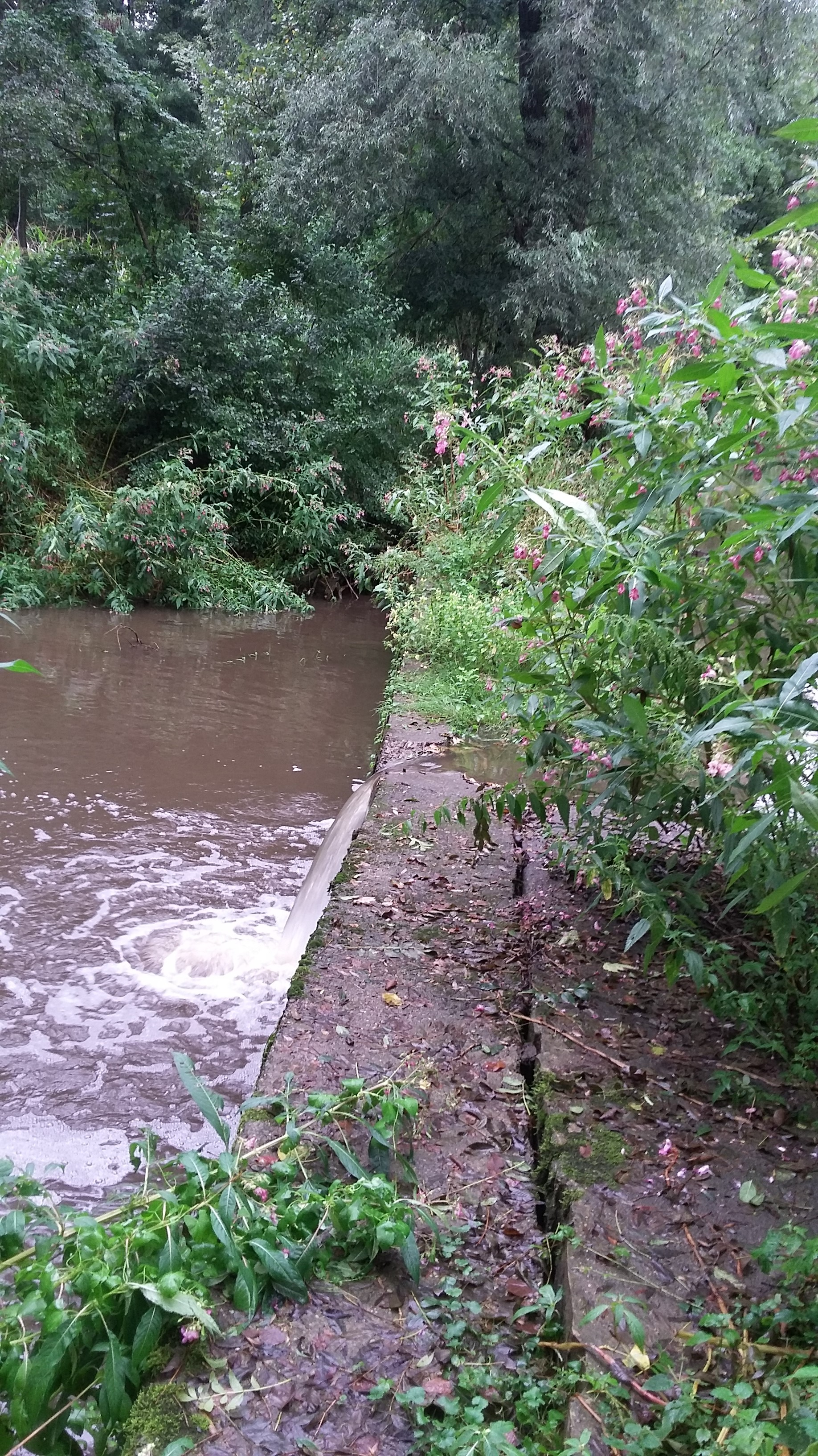 Abtrennung des Mühlbaches in das alte Bachbett